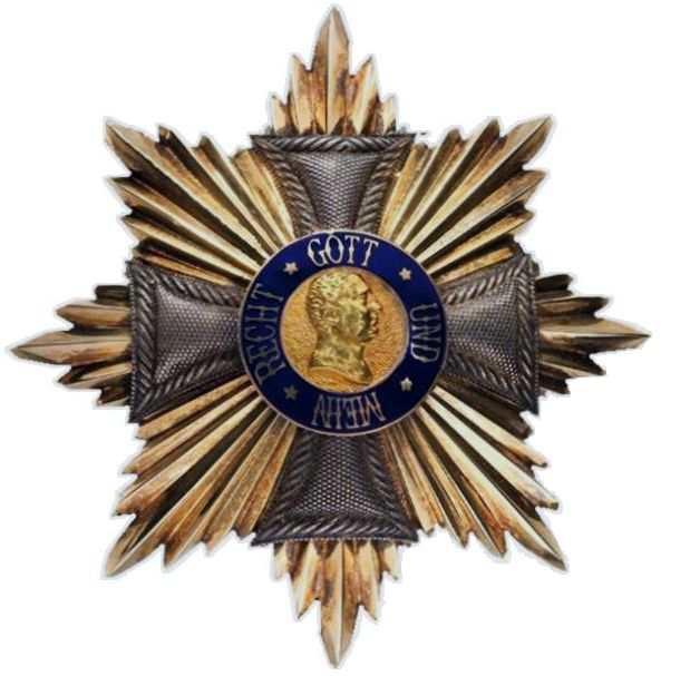 Ster uit mijn verzameling